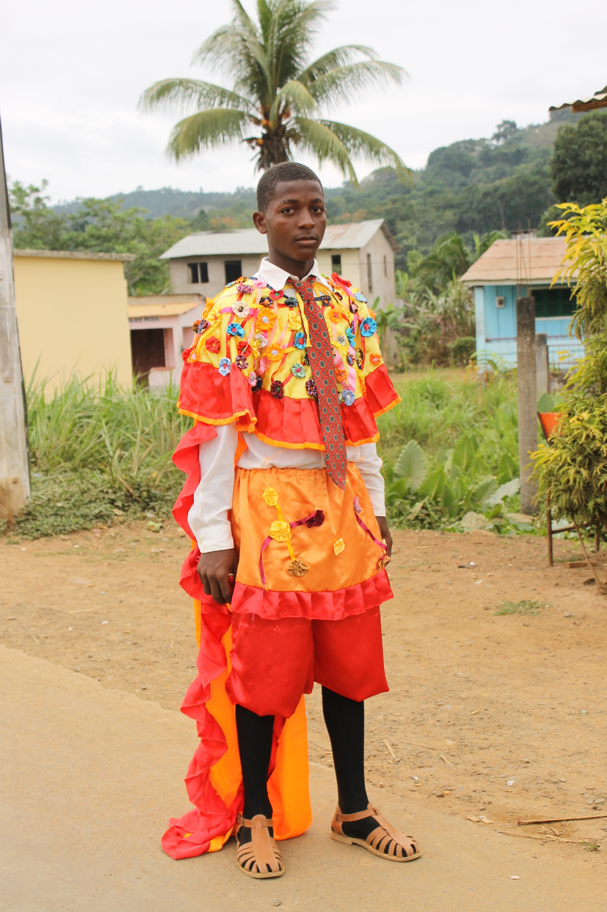 Participante en el Auto de Floripes This is an image of the Biosphere Reserve: Island of Príncipe Biosphere Reserve